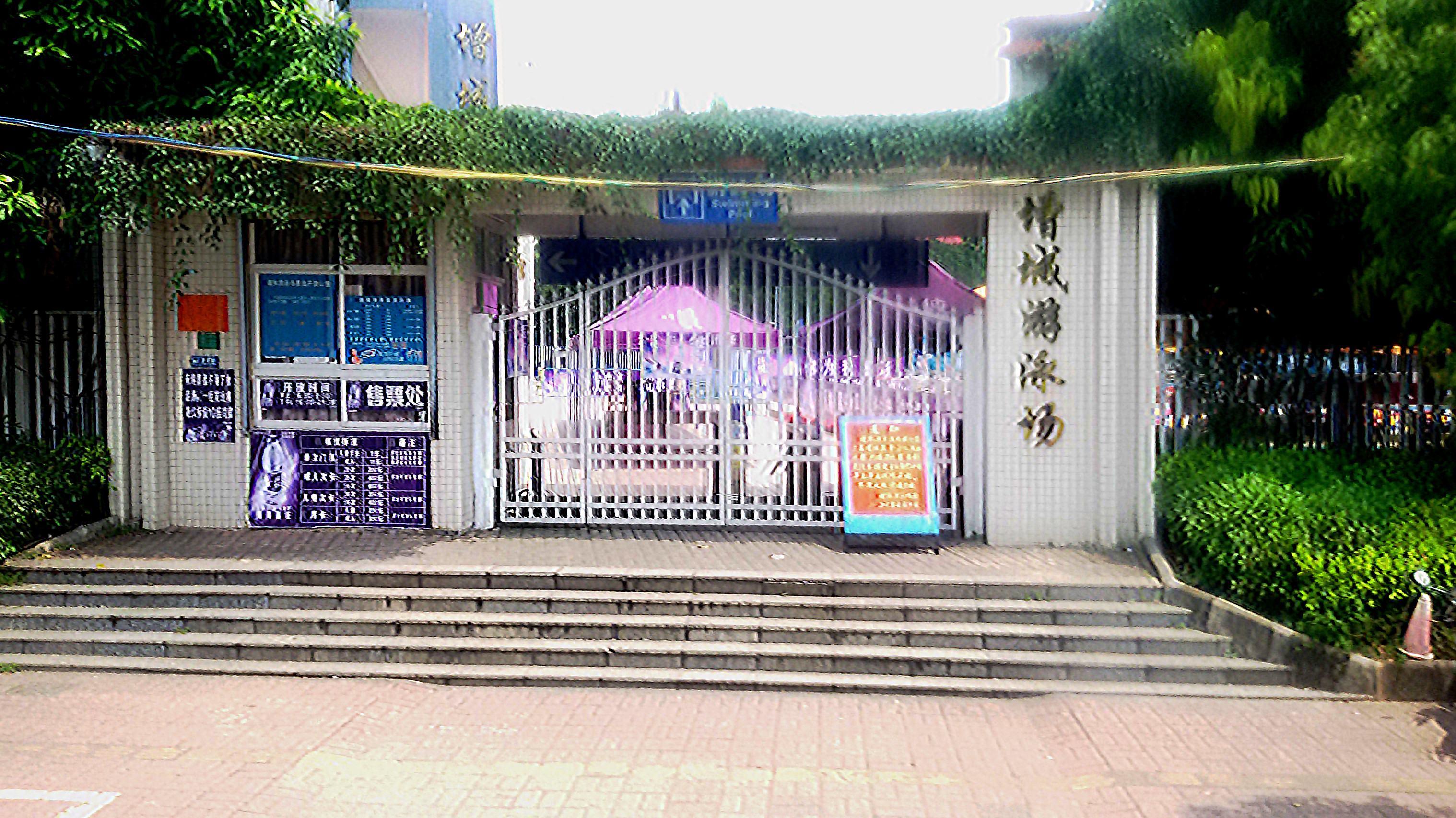 粵語: 增城游泳場